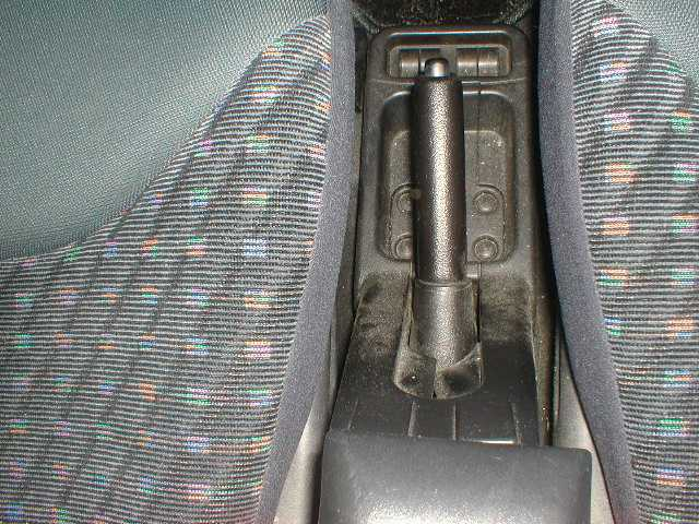 Parking brake handle.